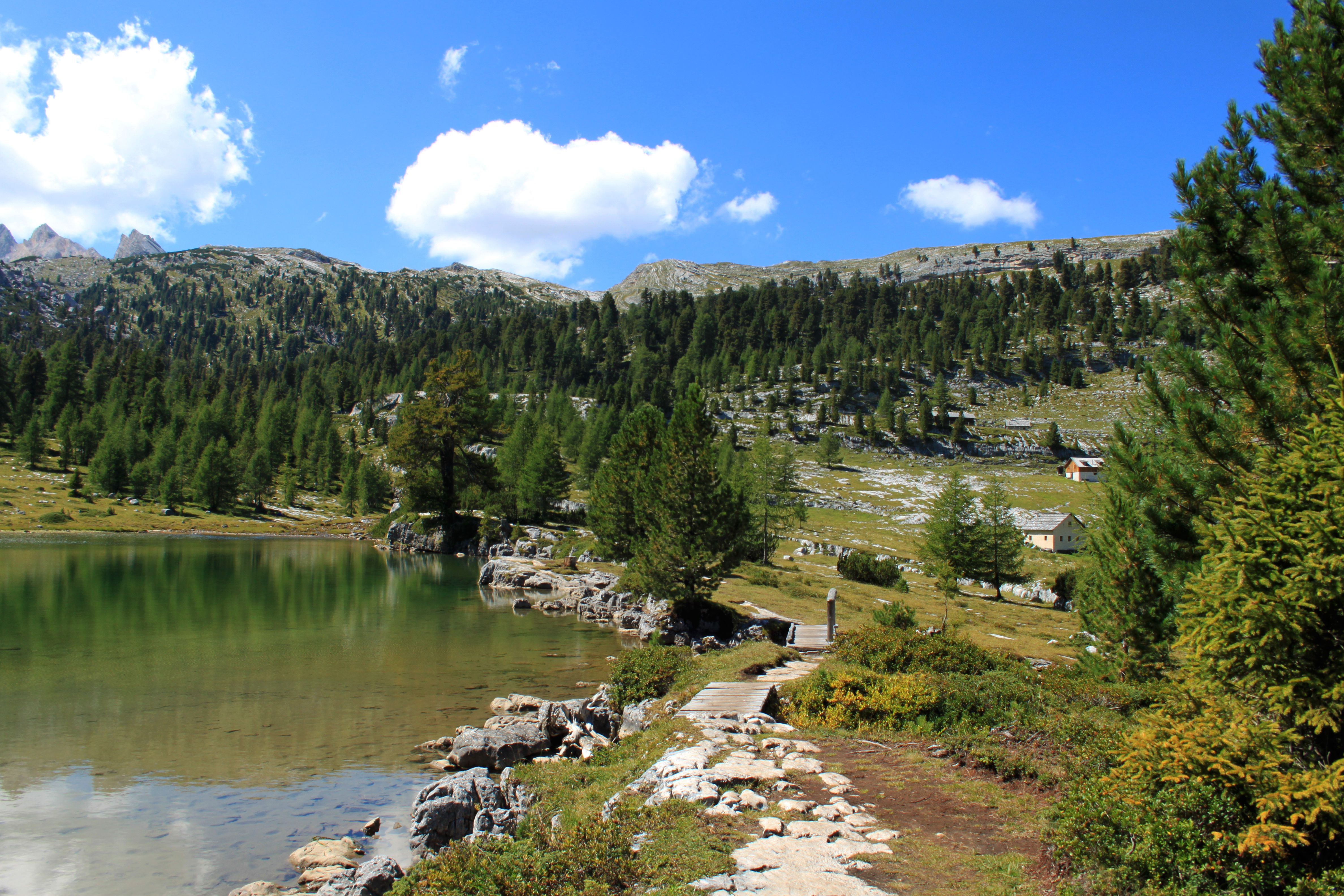 Parco naturale Fanes - Sennes - Braies (Q740279)